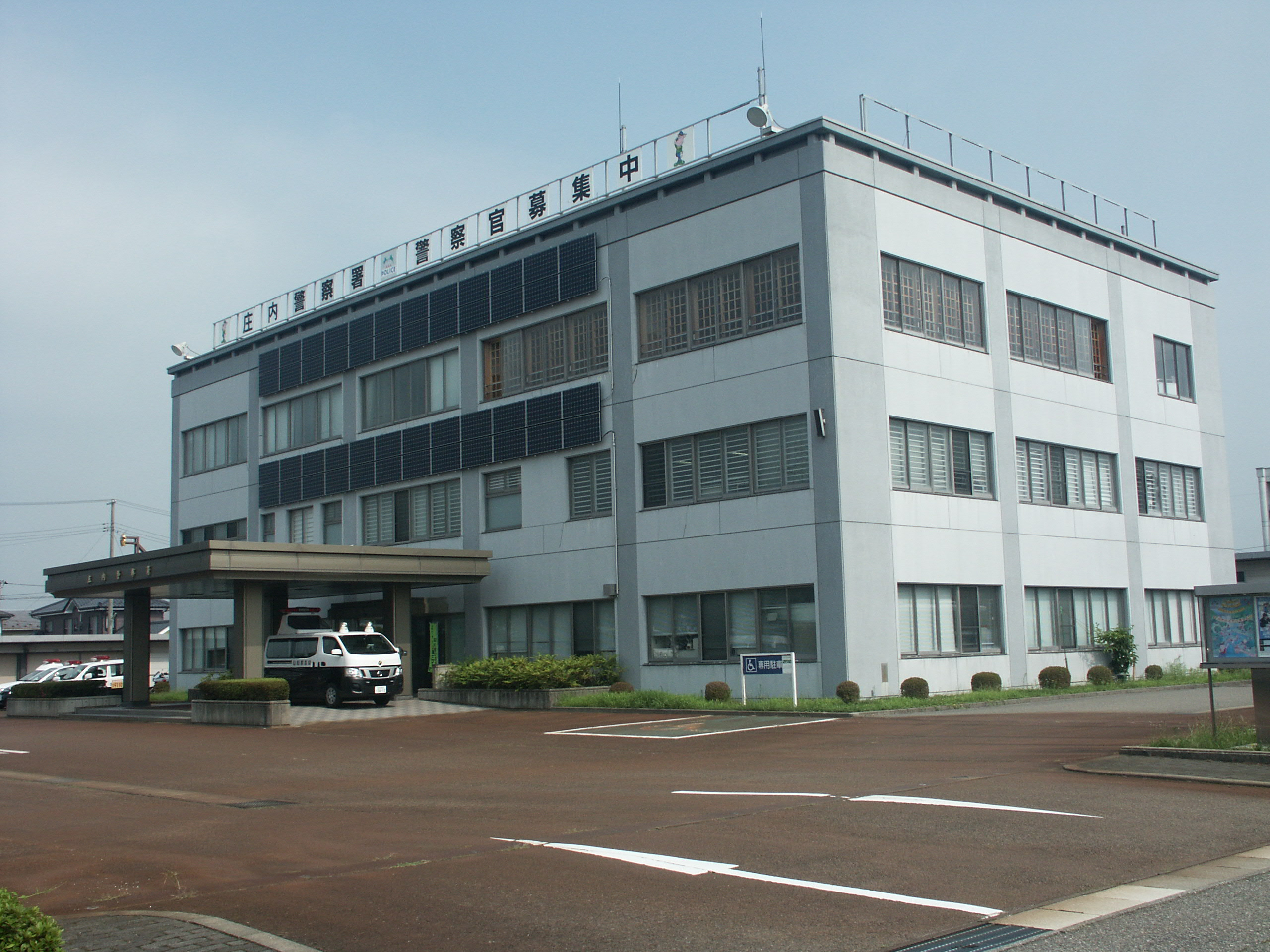 山形県庄内警察署庁舎